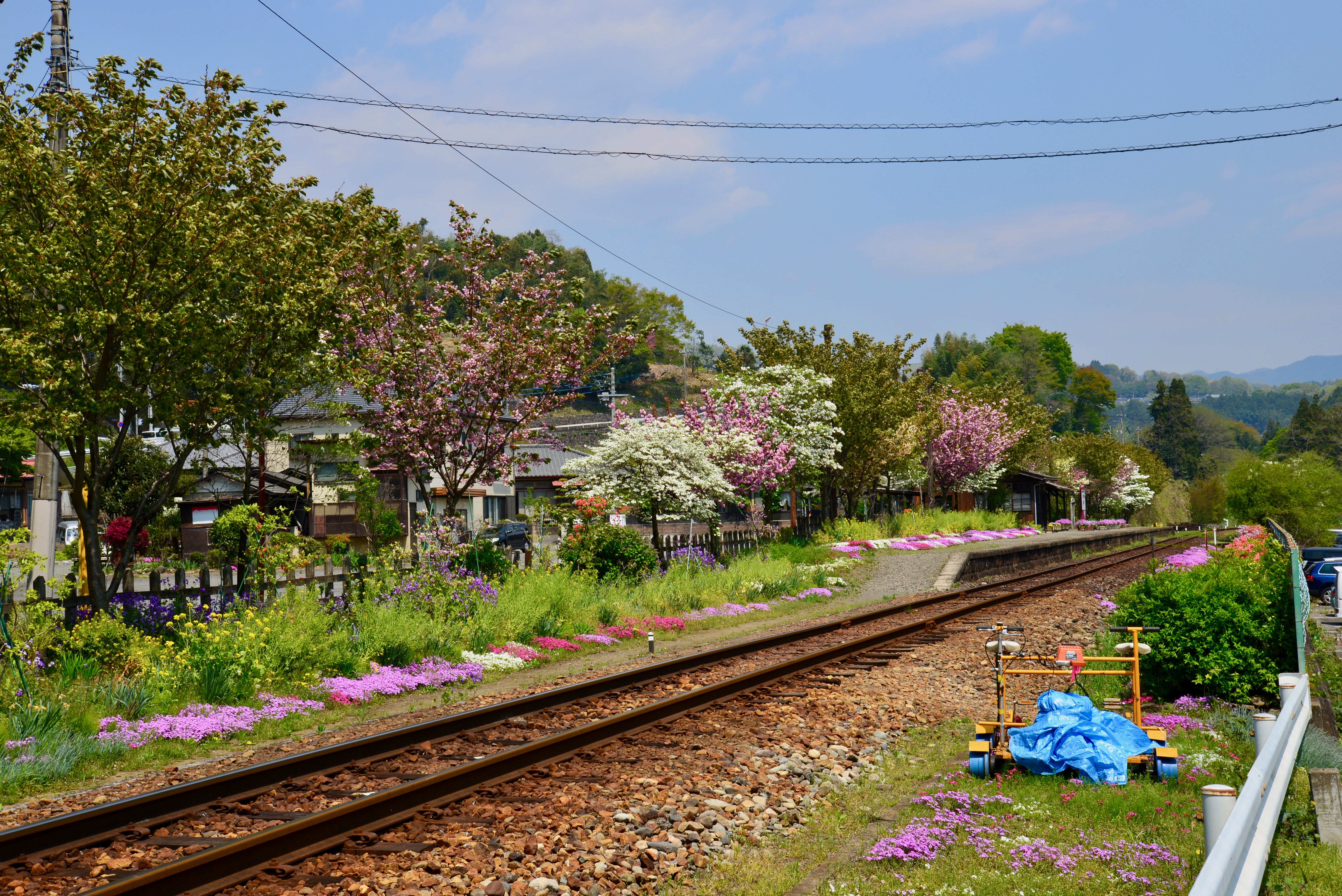 わたらせ渓谷鐵道上神梅駅